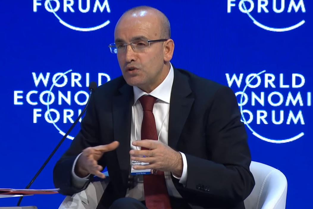 Başbakan Yardımcısı Mehmet Şimşek Davos'ta